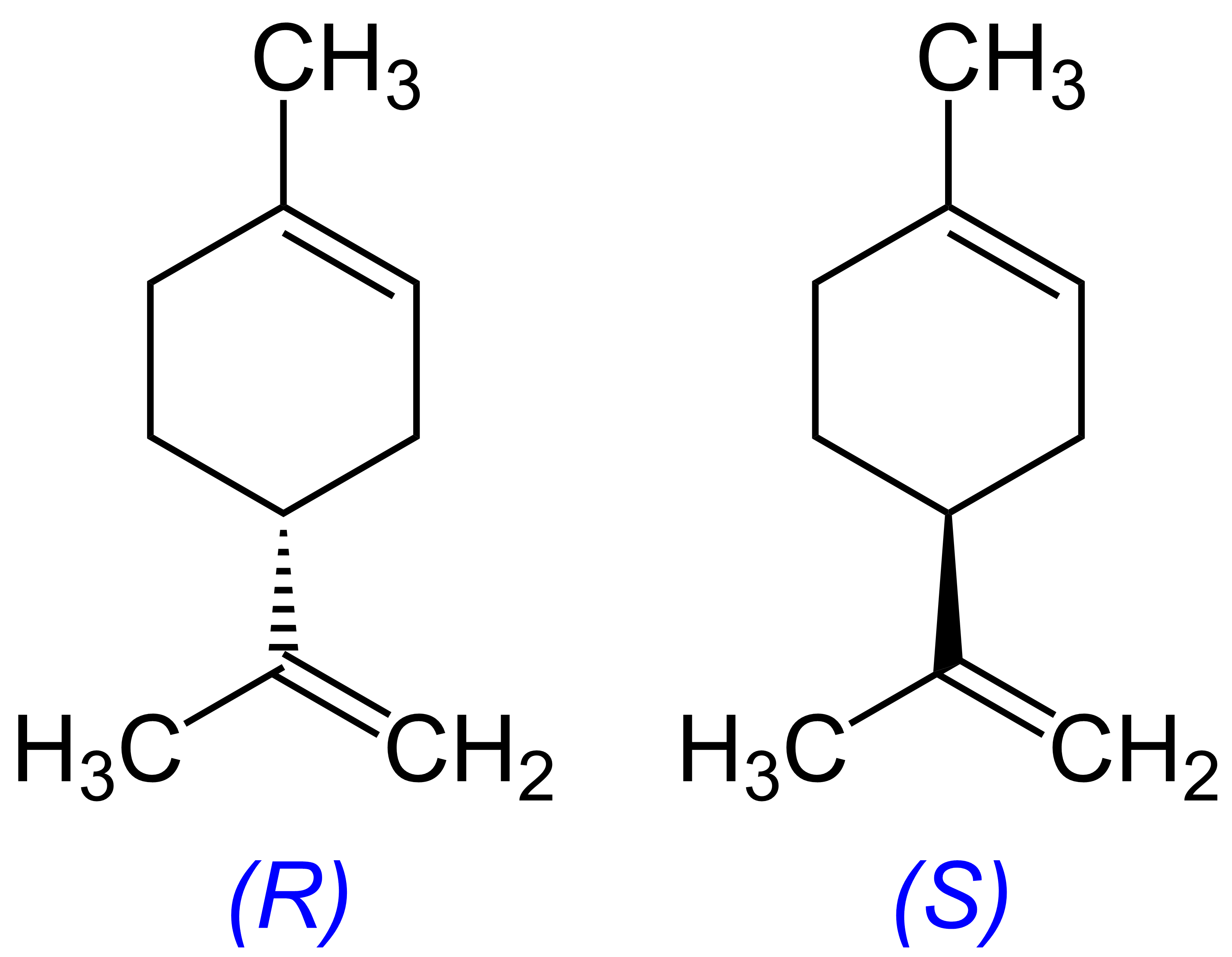 Limonene enantiomers, structure formula